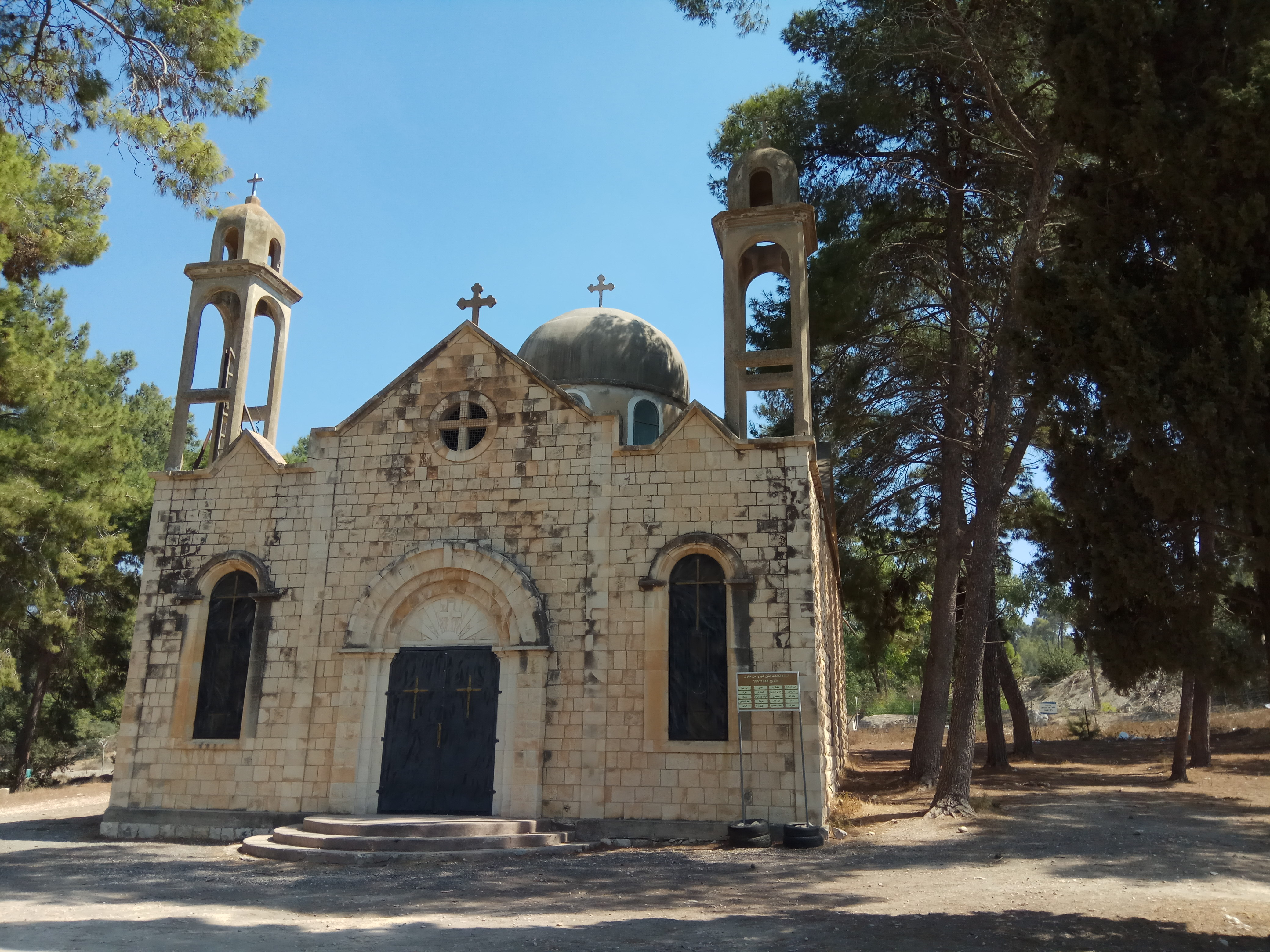 מעלוּל היה כפר ערבי שהתקיים בשוליו הצפוניים של עמק יזרעאל, על שלוחה מערבית של הרי נצרת, כ-6 ק"מ דרומית-מערבית לעיר נצרת. הכפר היה מאוכלס ברובו באוכלוסייה נוצרית. במהלך מלחמת העצמאות, במסגרת מבצע דקל נגד צבא ההצלה, נכבש הכפר ב-15 ביולי 1948 על ידי כוח מחטיבת גולני. בתי הכפר נהרסו. לאחר הריסתו עברו רבים מתושביו לנצרת וליפיע הסמוכות. כיום נותרו באתר שתי כנסיות שאחת מהן שופצה בשנת 2010 ומופעלת על ידי צאצאי בני הכפר.